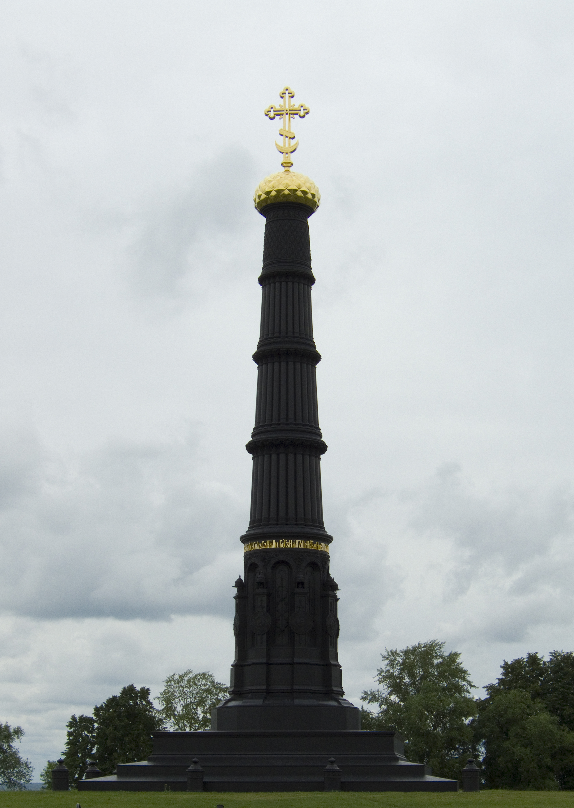 Монумент на Куликовом поле в память о битве 1380 года.